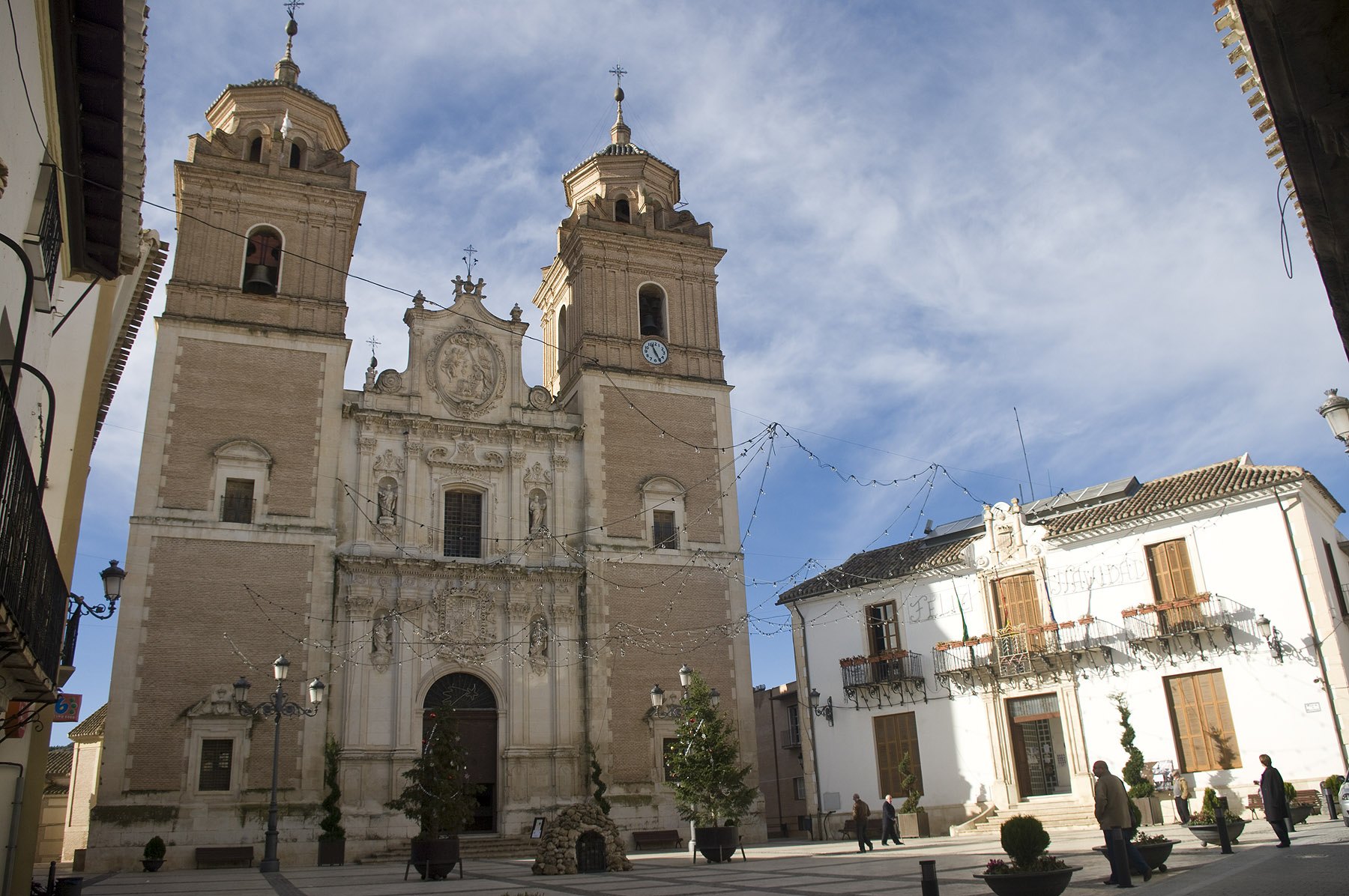 Iglesia de Nuestra Señora de la Encarnación